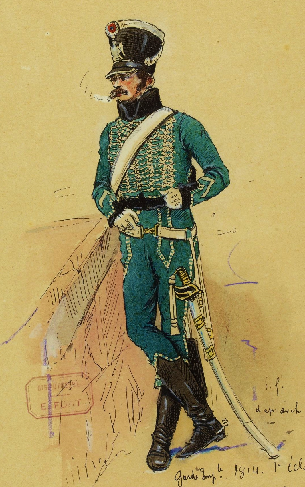 Sous-officier du 1er régiment d'éclaireurs de la Garde impériale, 1814. Il provient d'un régiment de gardes d'honneur, dont il a conservé l'uniforme.